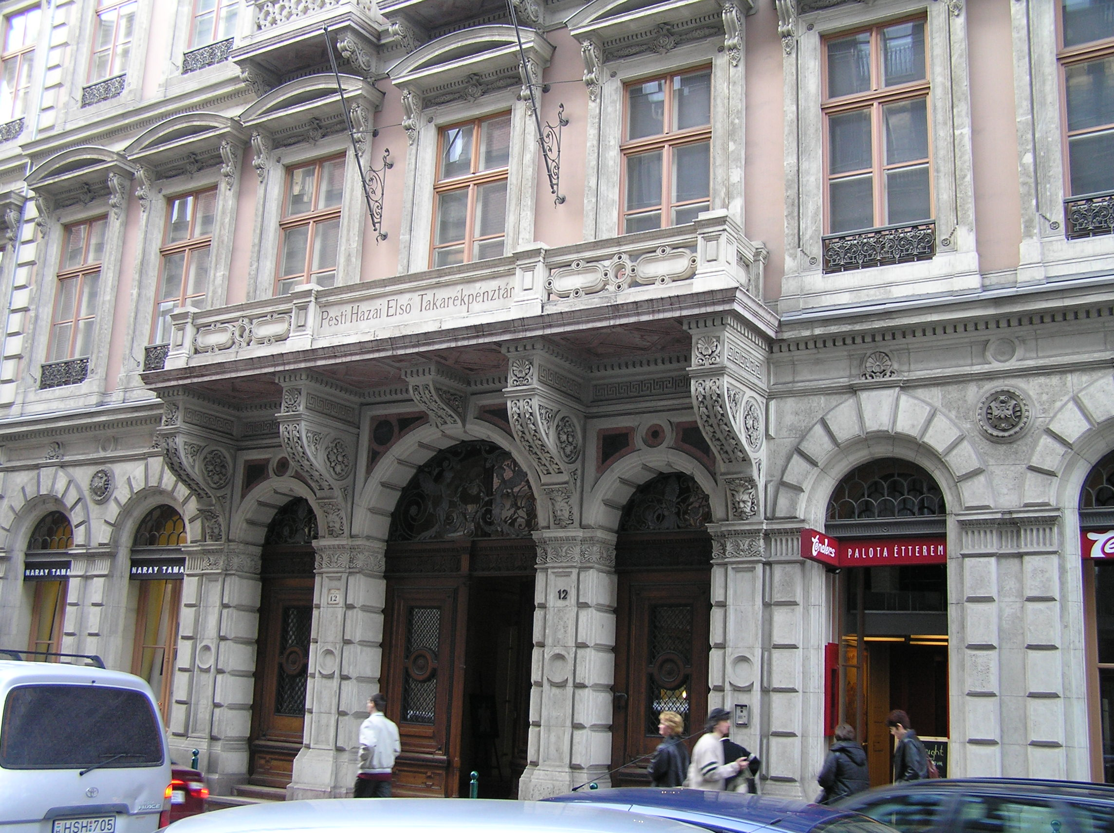 Budapest V. ker., Károlyi u. 12. Ybl-palota, a Pesti Hazai Első Takarékpénztár egykori épülete